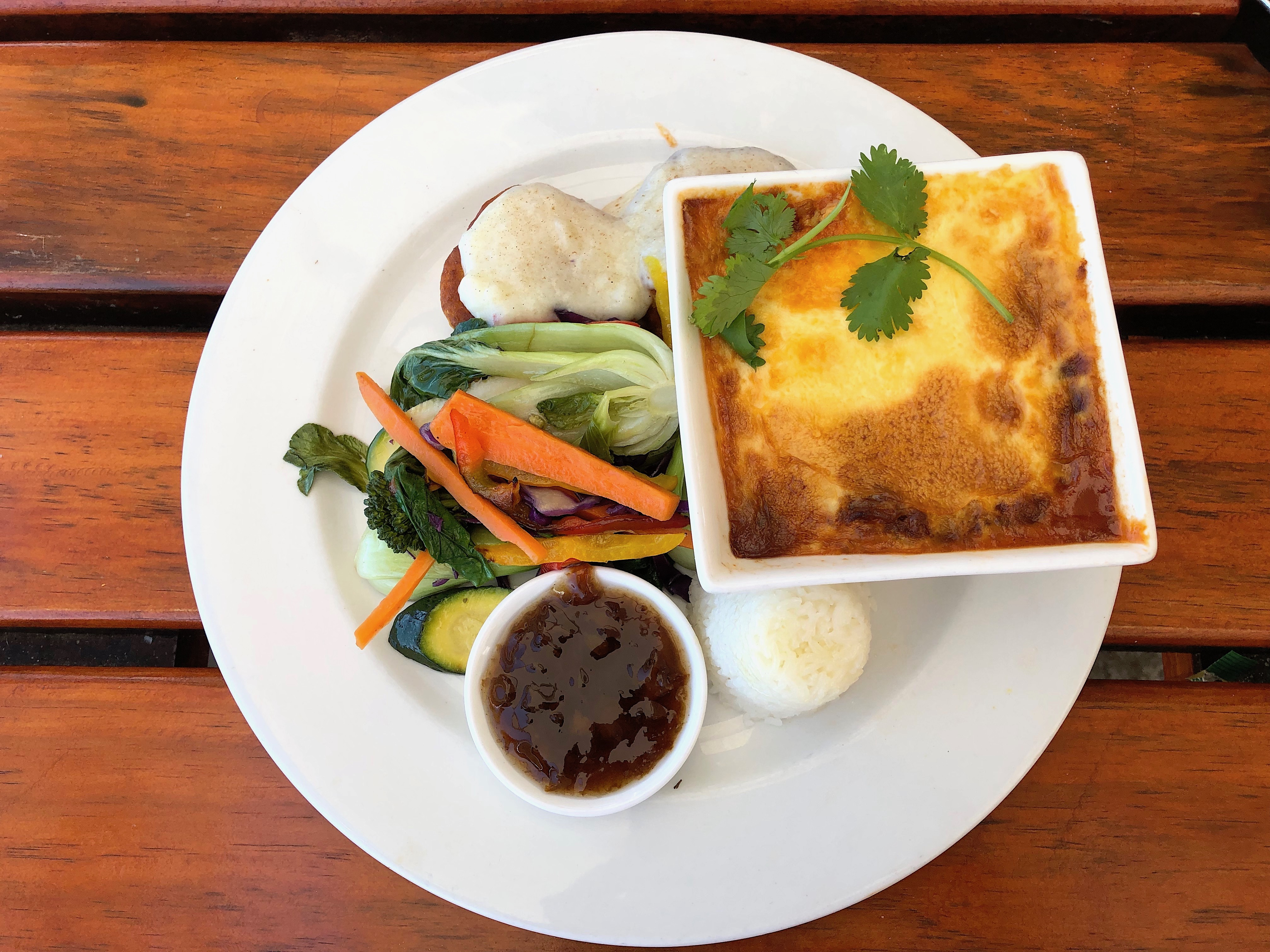 Bobotie, Südafrikanisches Gericht